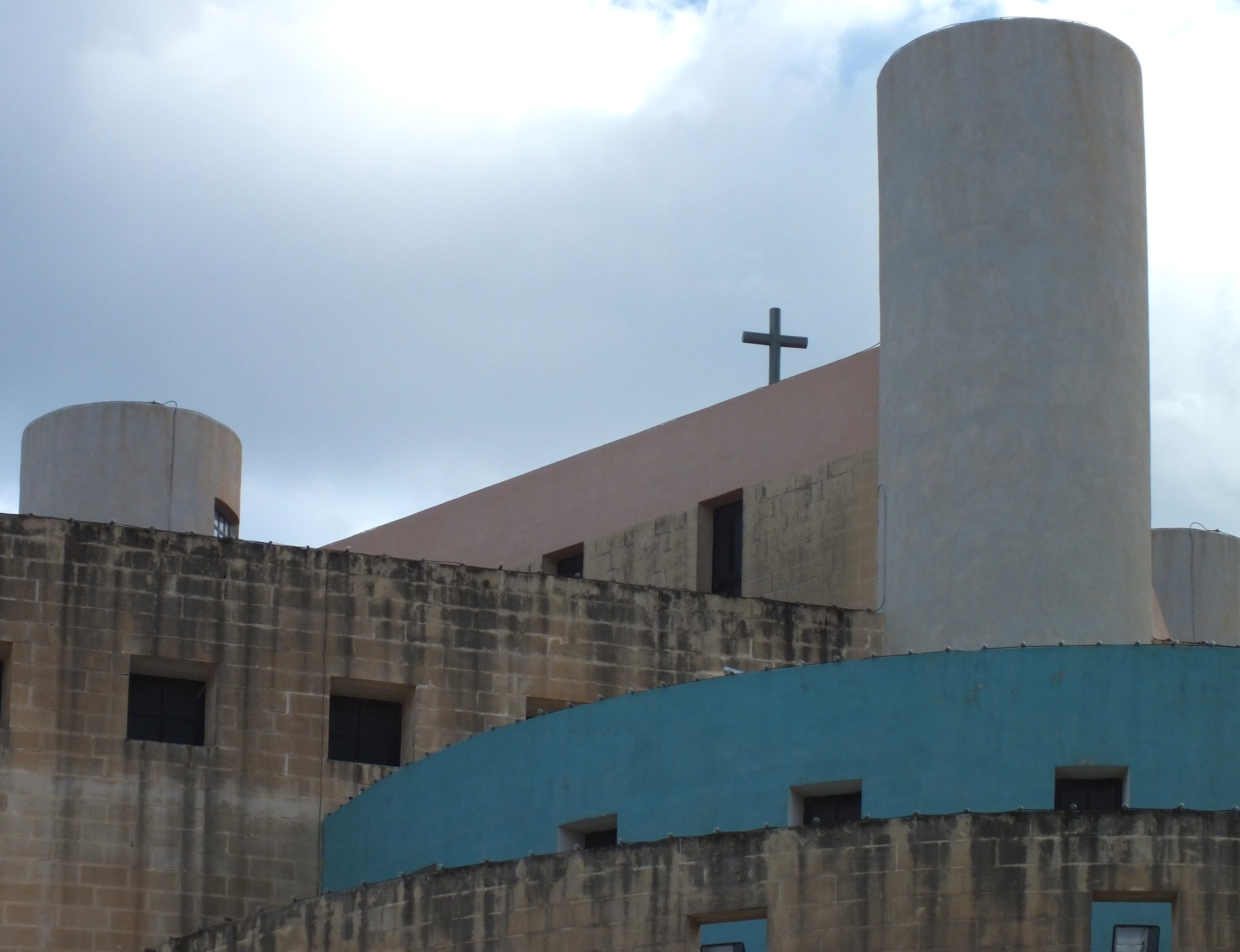 Malta, St. Franziskus-Kirche (Church of St Francis of Assisi), Ortsteil Qawra von St Pauls bay